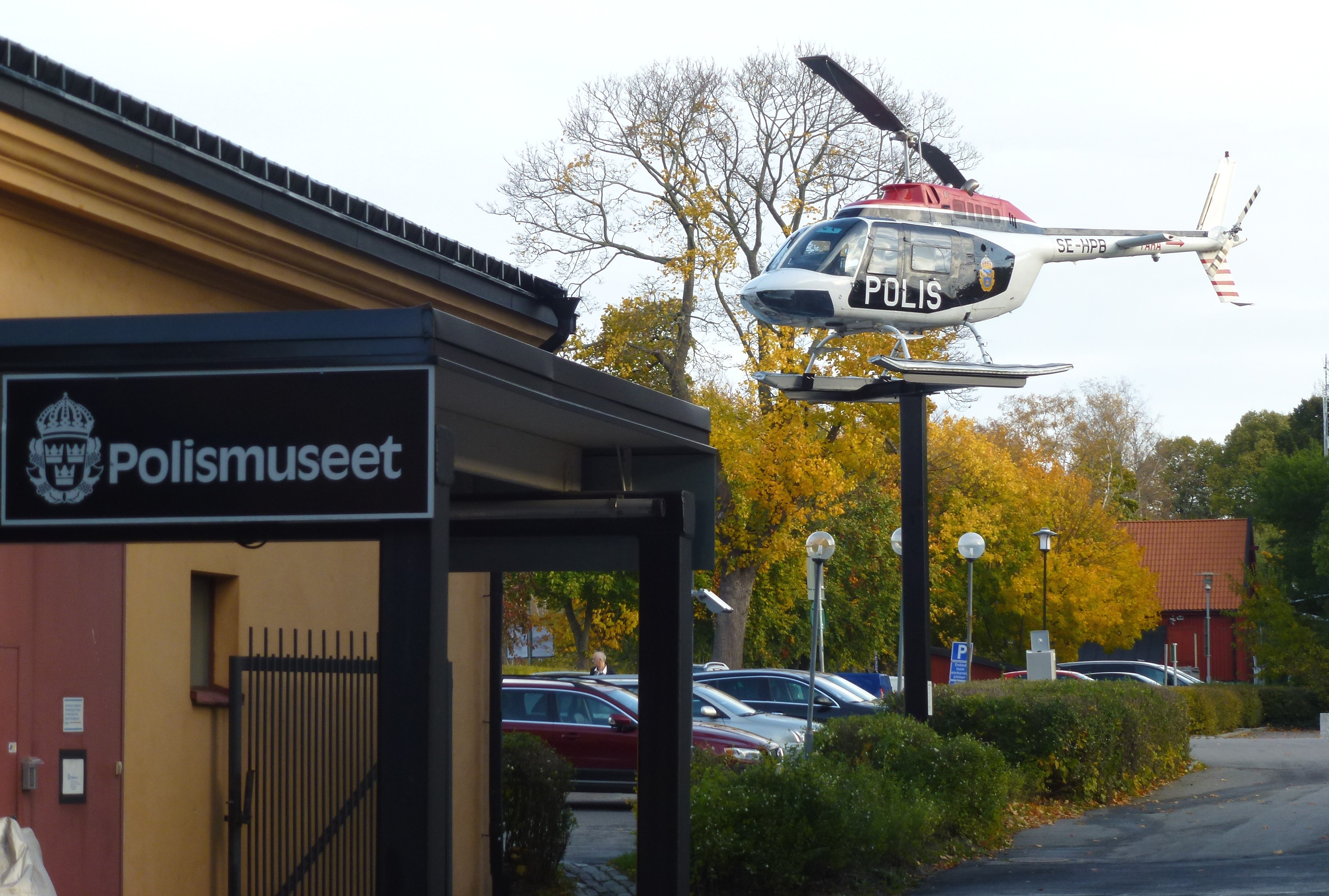 Polismuseet 2012, entré